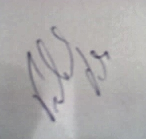 Libor Prochazka